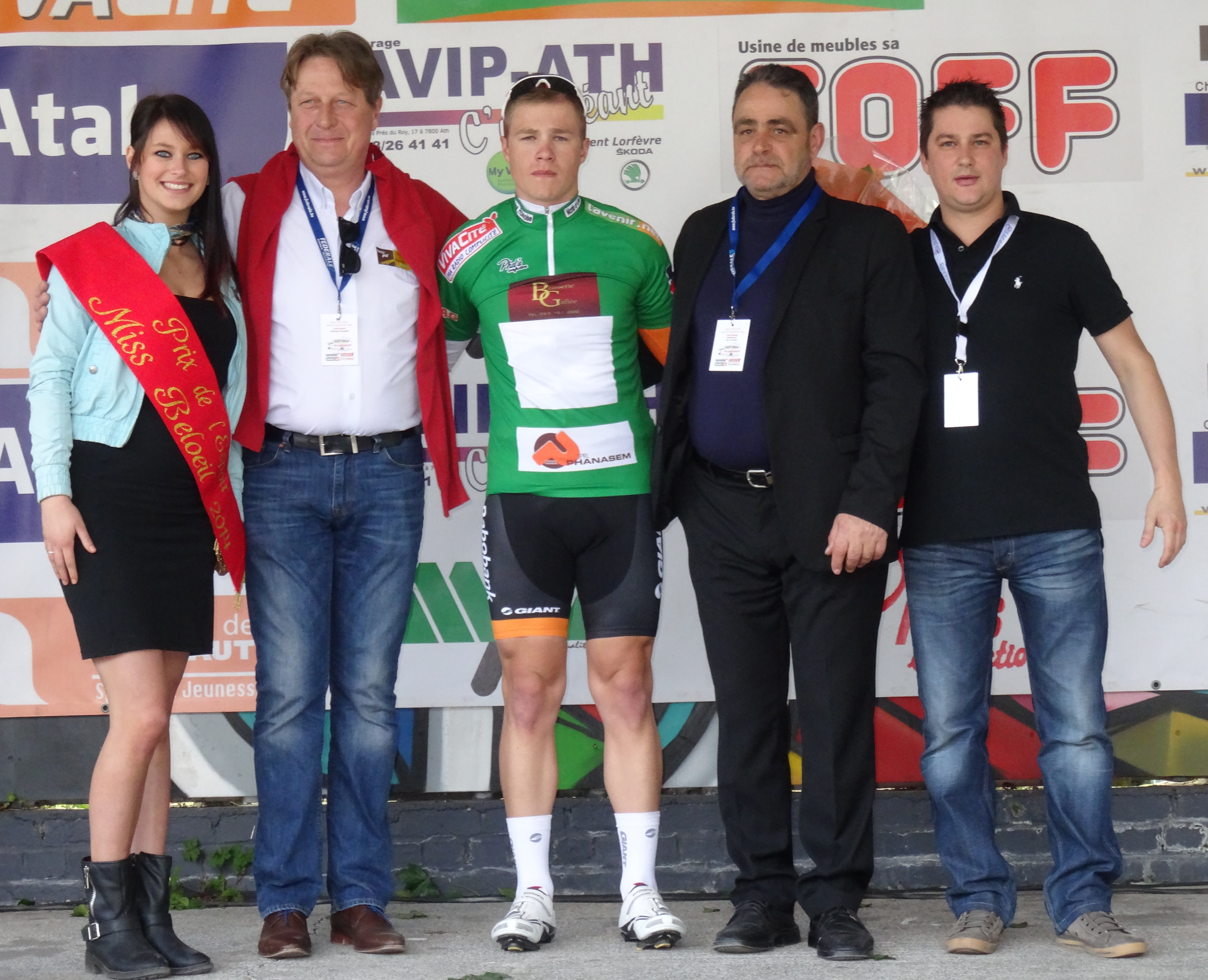 Triptyque des Monts et Châteaux 2014, étape 2b, 5 avril 2014, départ d'Estaimbourg. Depicted person: André Looij Depicted team: Rabobank Development no fallback page found for autotranslate (base=By courtesy of Triptyque des Monts et Châteaux 2014, lang=en)